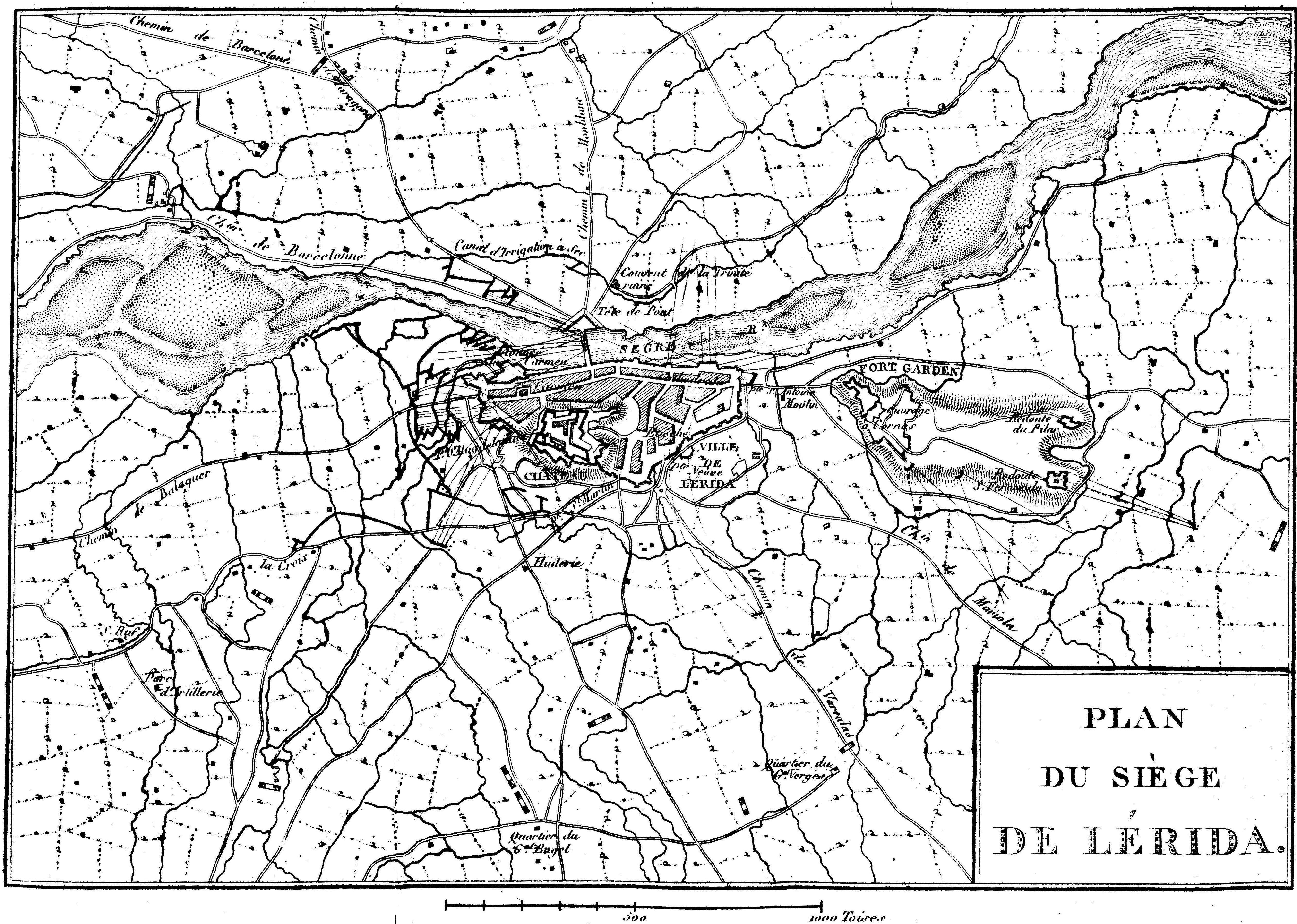 T10_de Victoire conquête .... des français Panckouke & Lecointe, carte N°_86_siége_de LERIDA.